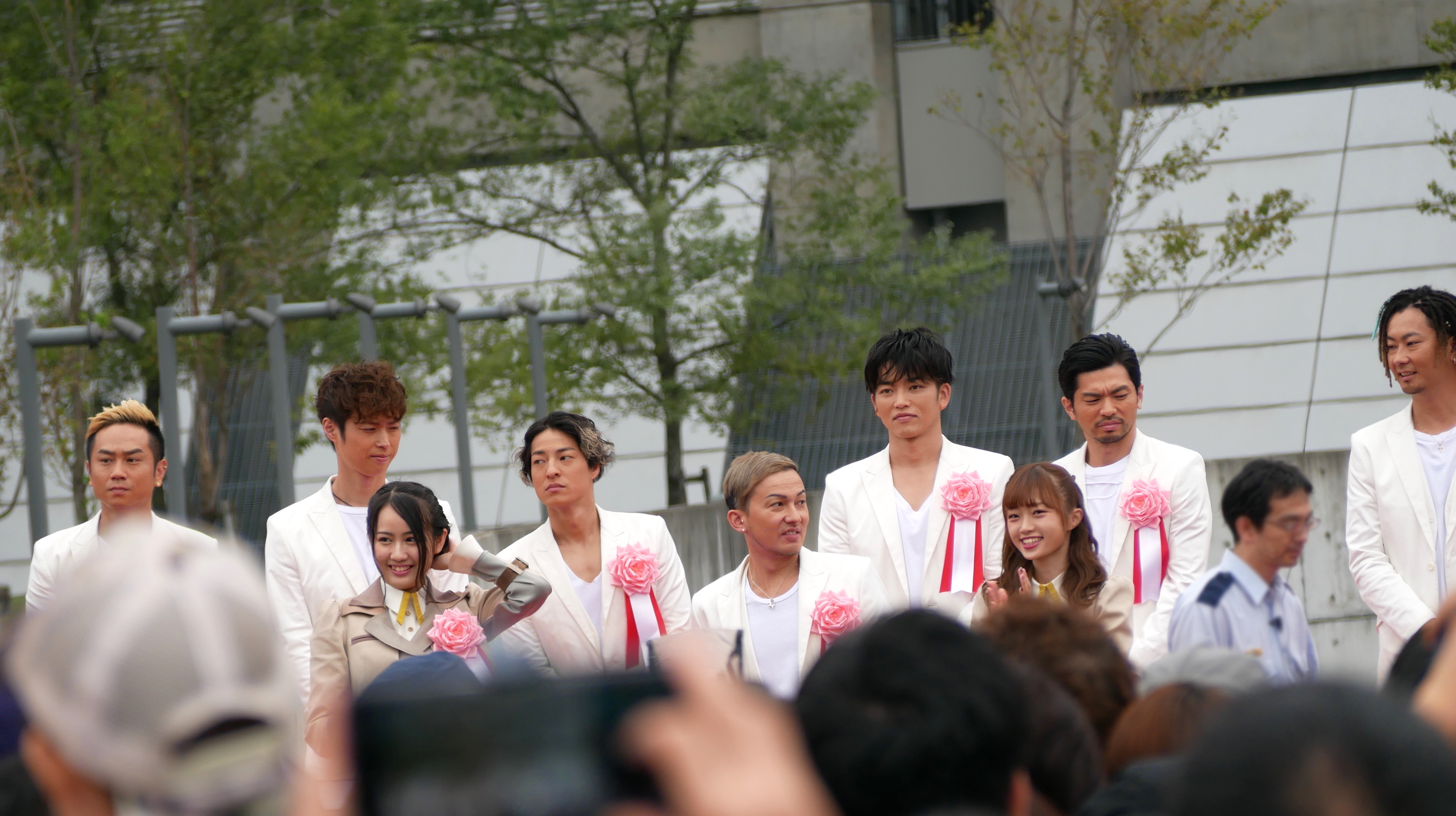 Da Pump (ダパンプ Da Panpu) is a Japanese boy band comprising lead vocalist, Issa Hentona and MCs Ken Okumoto, Yukinari Tamaki and Shinobu Miyara.(Front: Nanako Nishimura & Rika Nakai, members of NGT48, a Japanese idol girl group.)